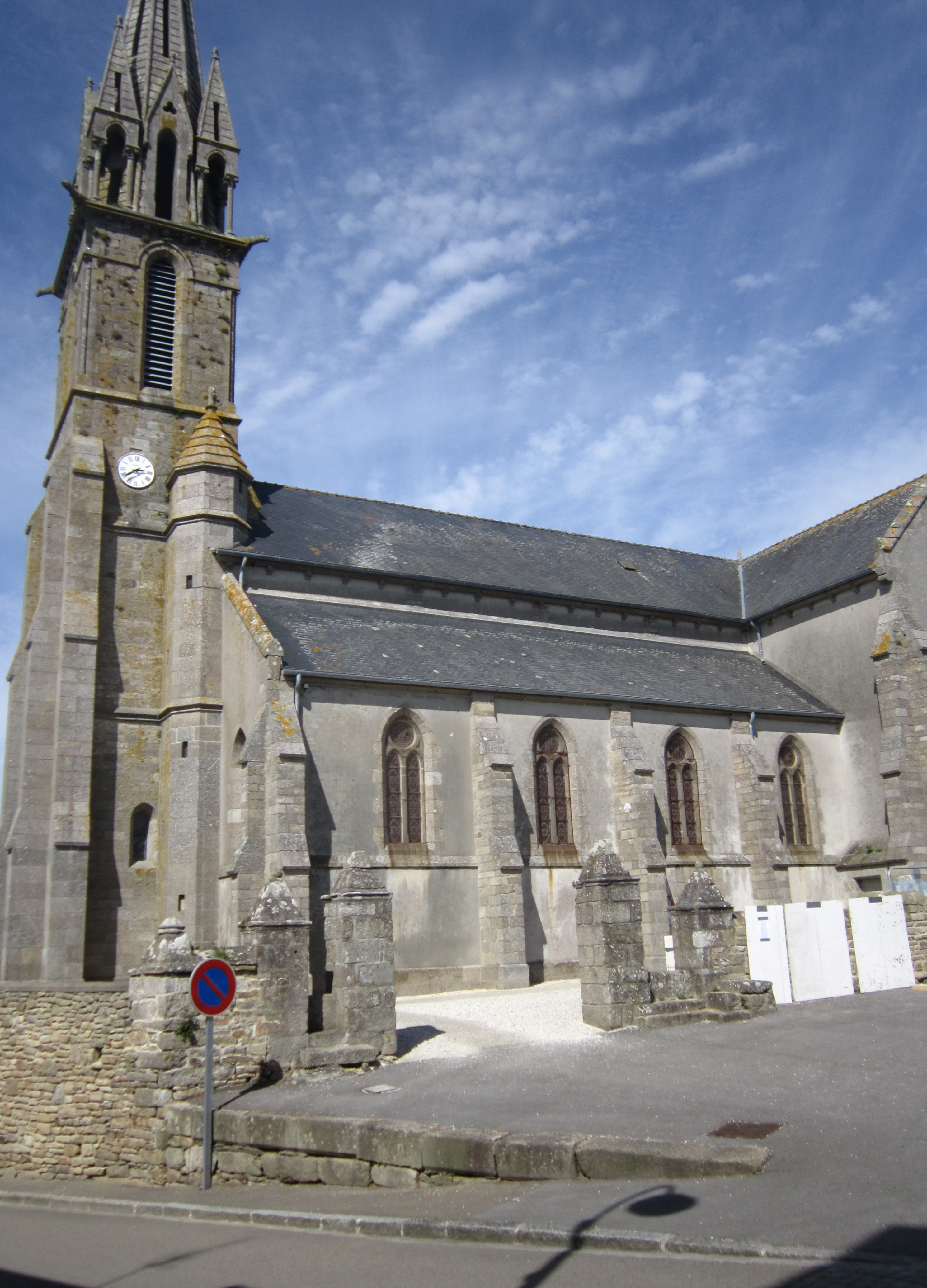 Landunvez : l'église paroissiale Saint-Gonval (fin XIXe).